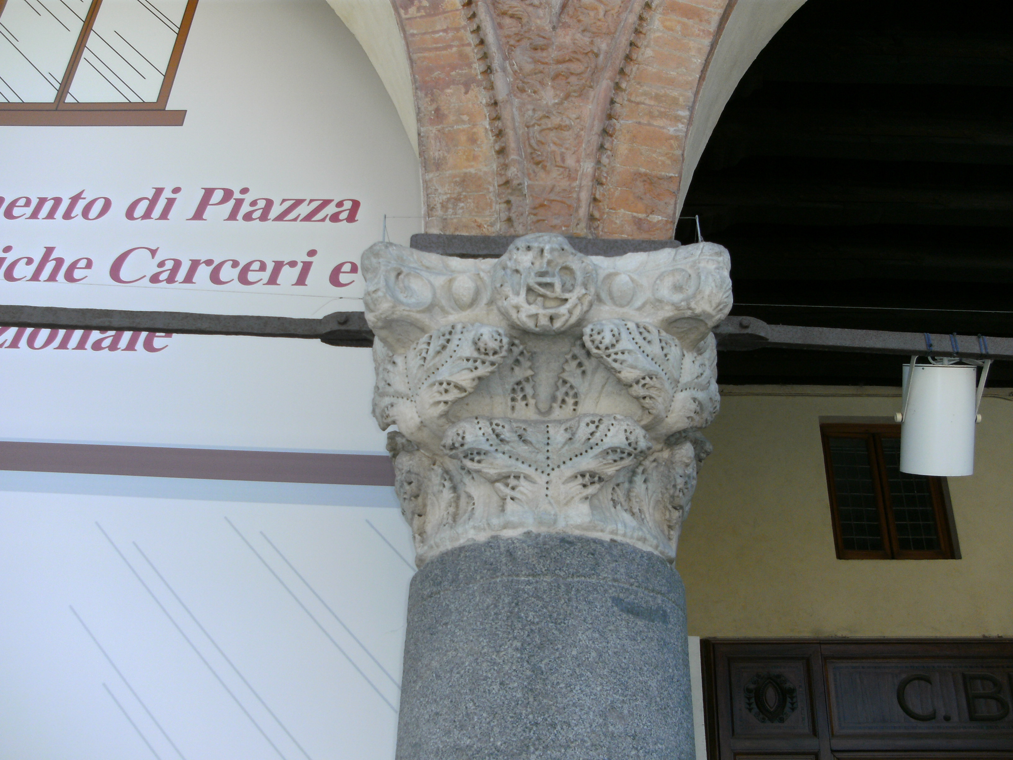 Ravenna (Italien), Piazza del Popolo, Venezianischer Palast (Teil des Rathauses der Stadt); Bild zeigt eine der Säulen des Venezianischen Palasts, die am oberen Rand ihres Kapitells ein kreisrundes Monogramm Theoderichs des Großen zeigen. (Die Säulen sollen von einer von den Venezianern abgerissenen arianischen Kirche stammen, die die Goten in ihrer Vorstadt erbaut hatten.)